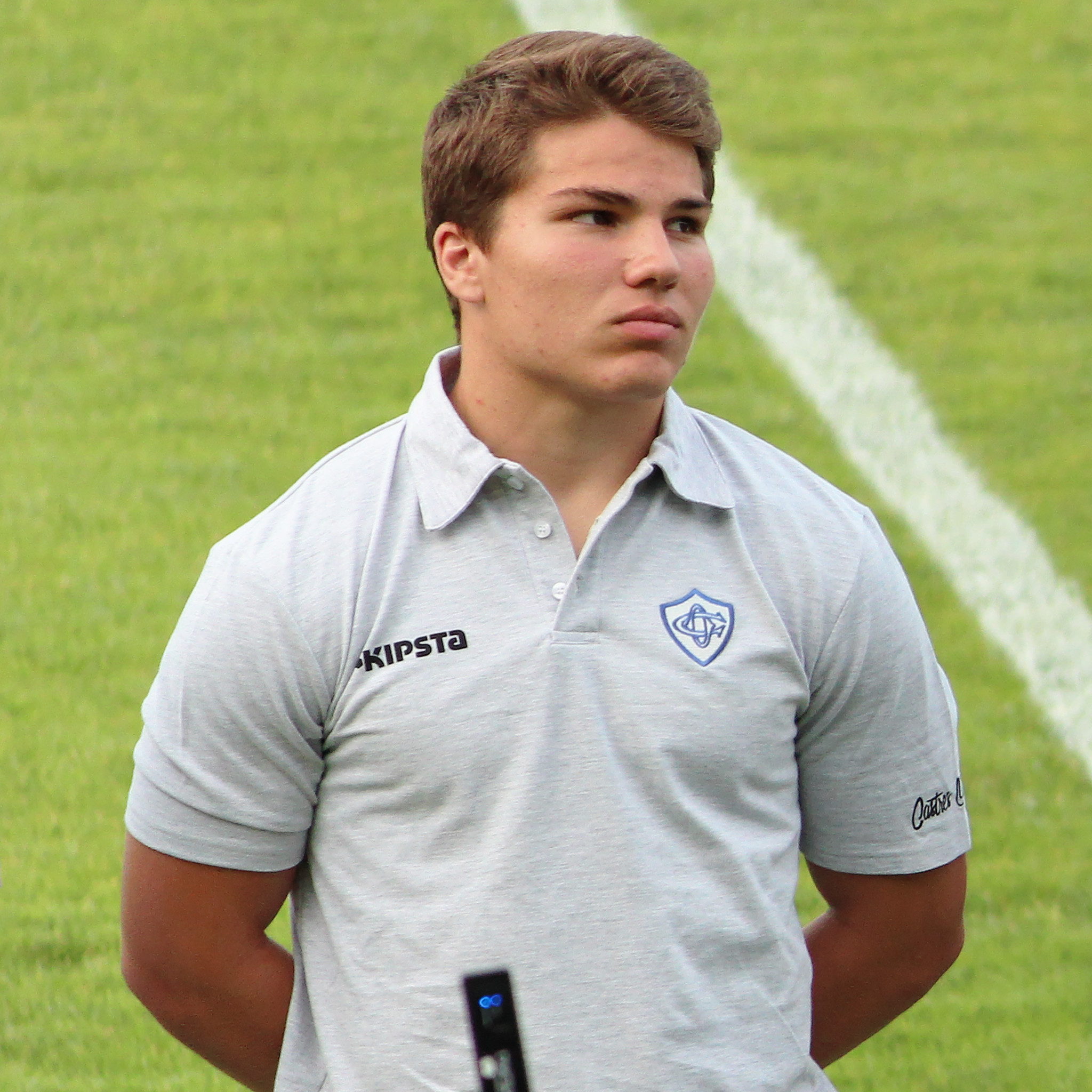 Joueurs du Castres Olympique lors de la présentation de l'équipe pour la saison 2015-2016